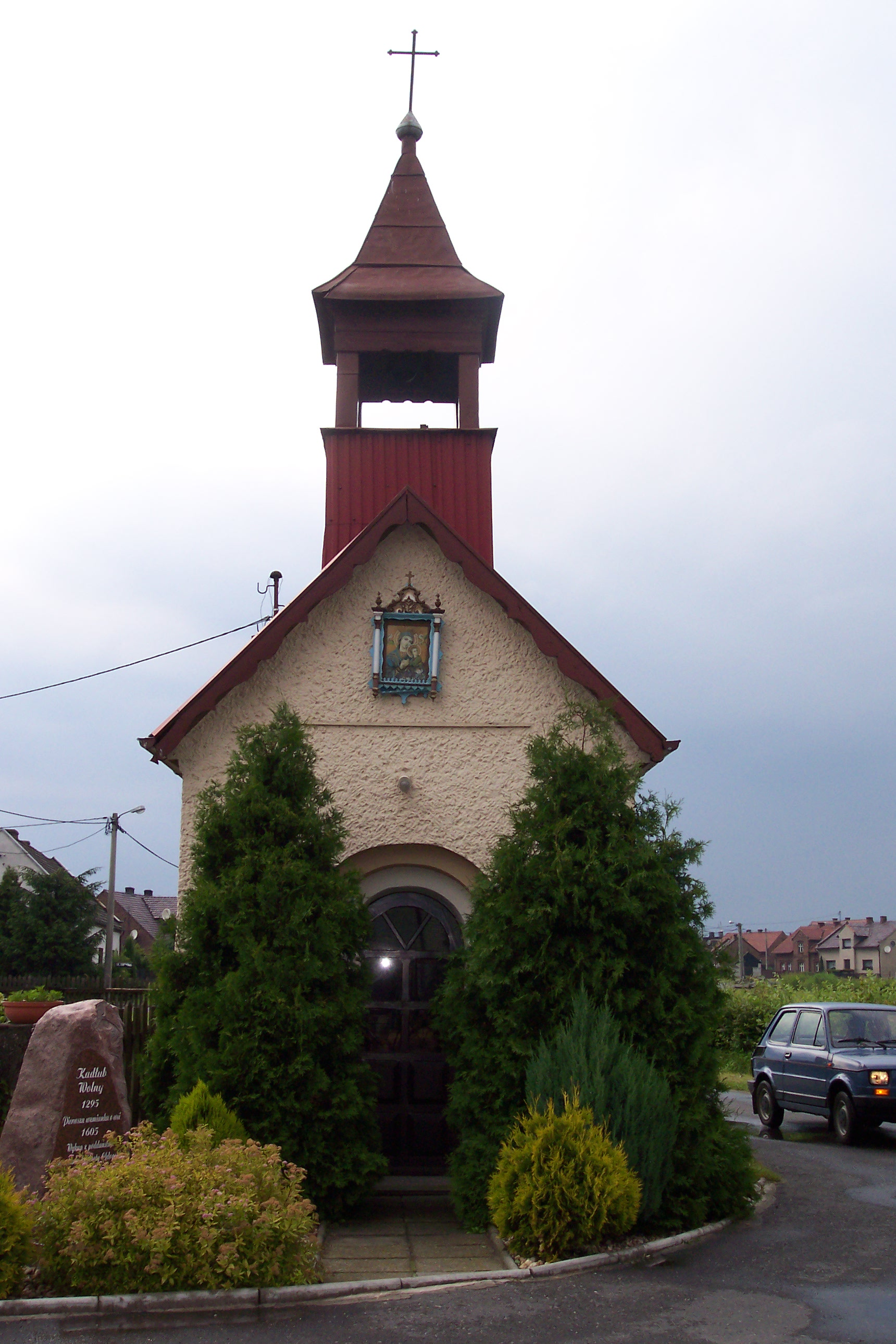 Kaplica w centrum Kadłuba Wolnego